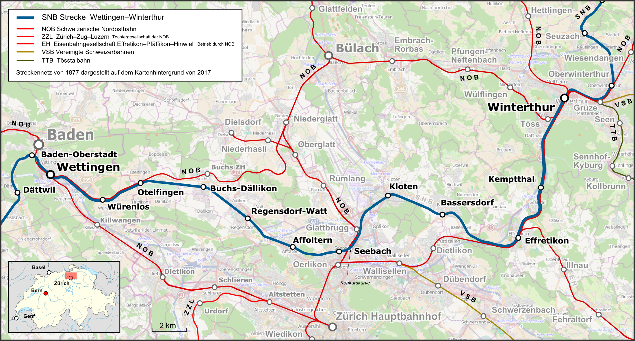 Karte der Strecke Wettingen—Winterthur der Schweizerischen Nationalbahn dargestellt im Eisenbahnnetz von 1877.